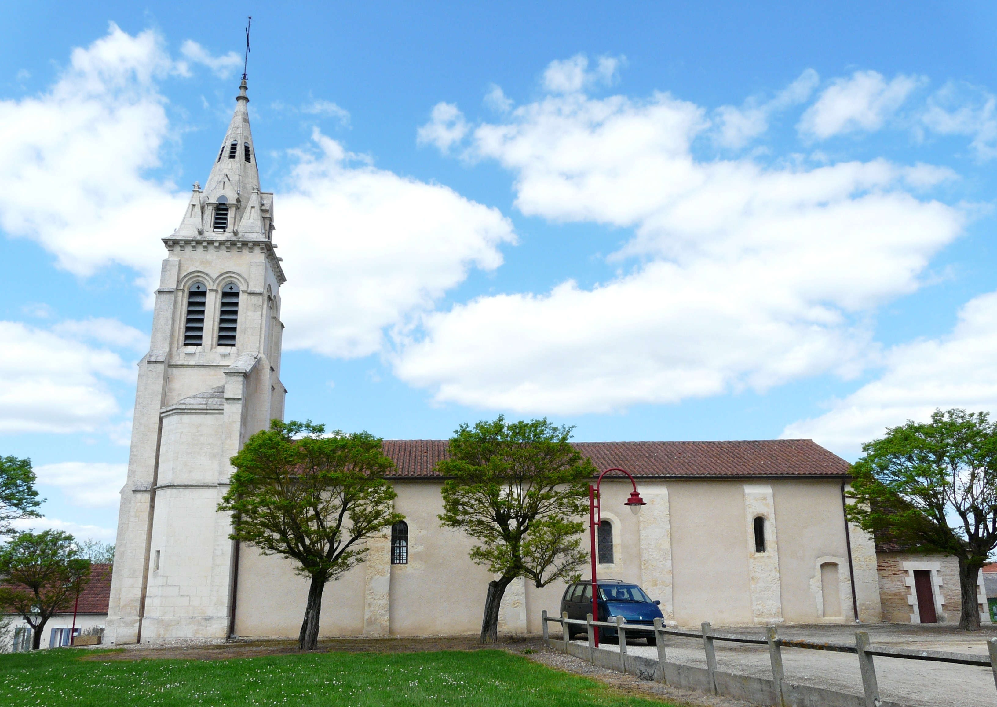 L'église de Saint-Géry, Dordogne, France.